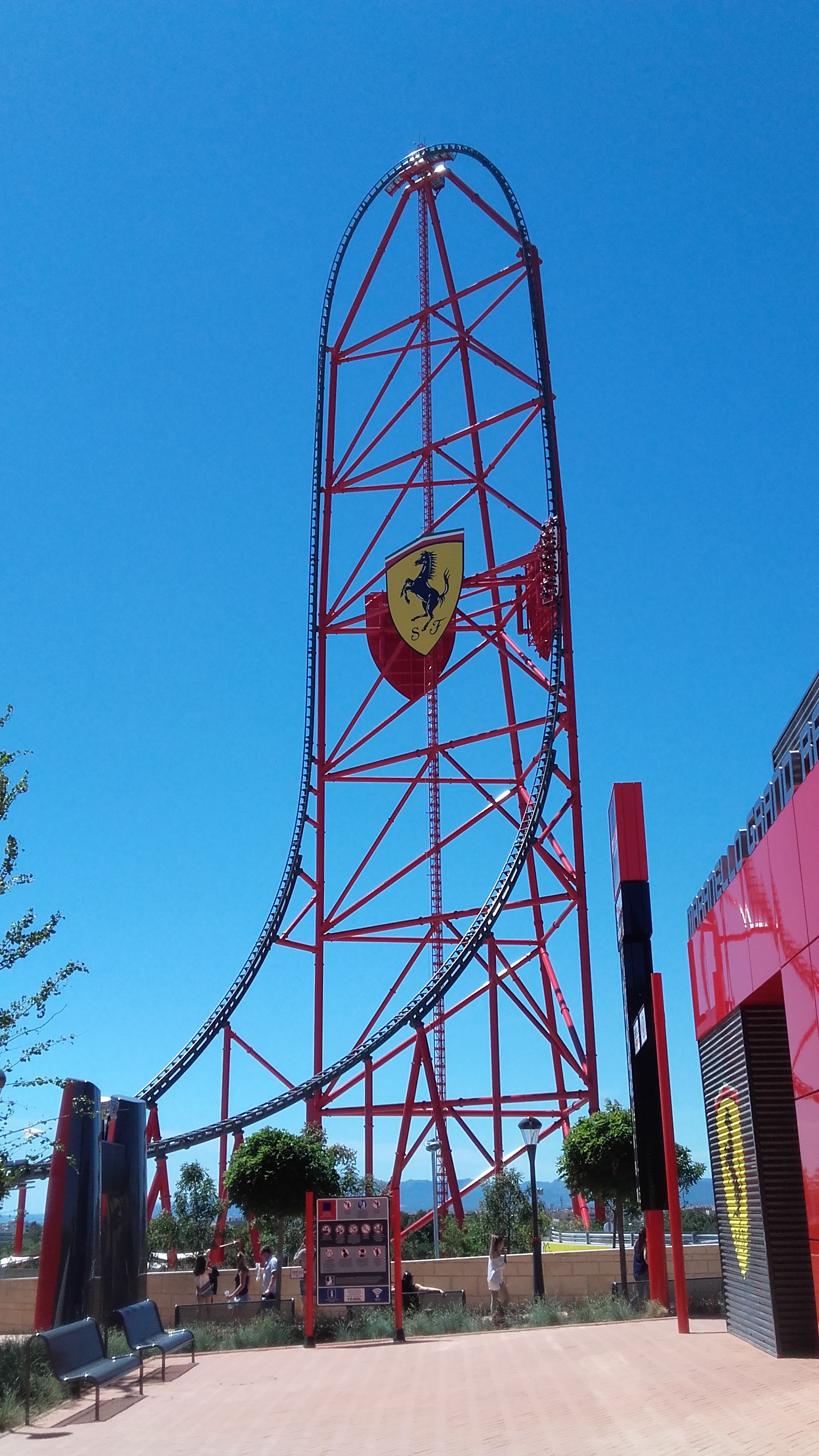 fl